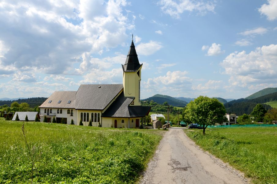 zastranie